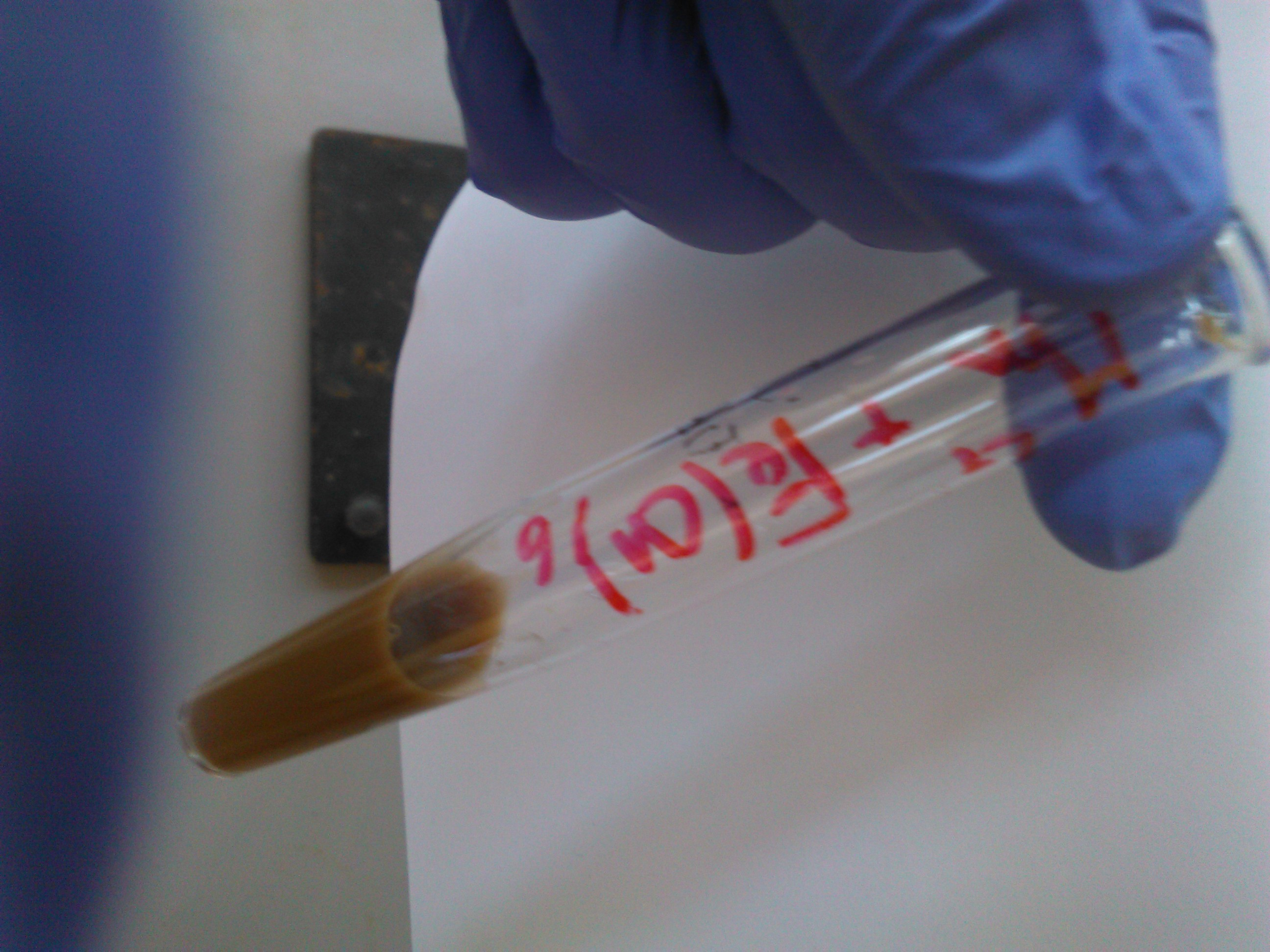 Ferricianuro di manganese